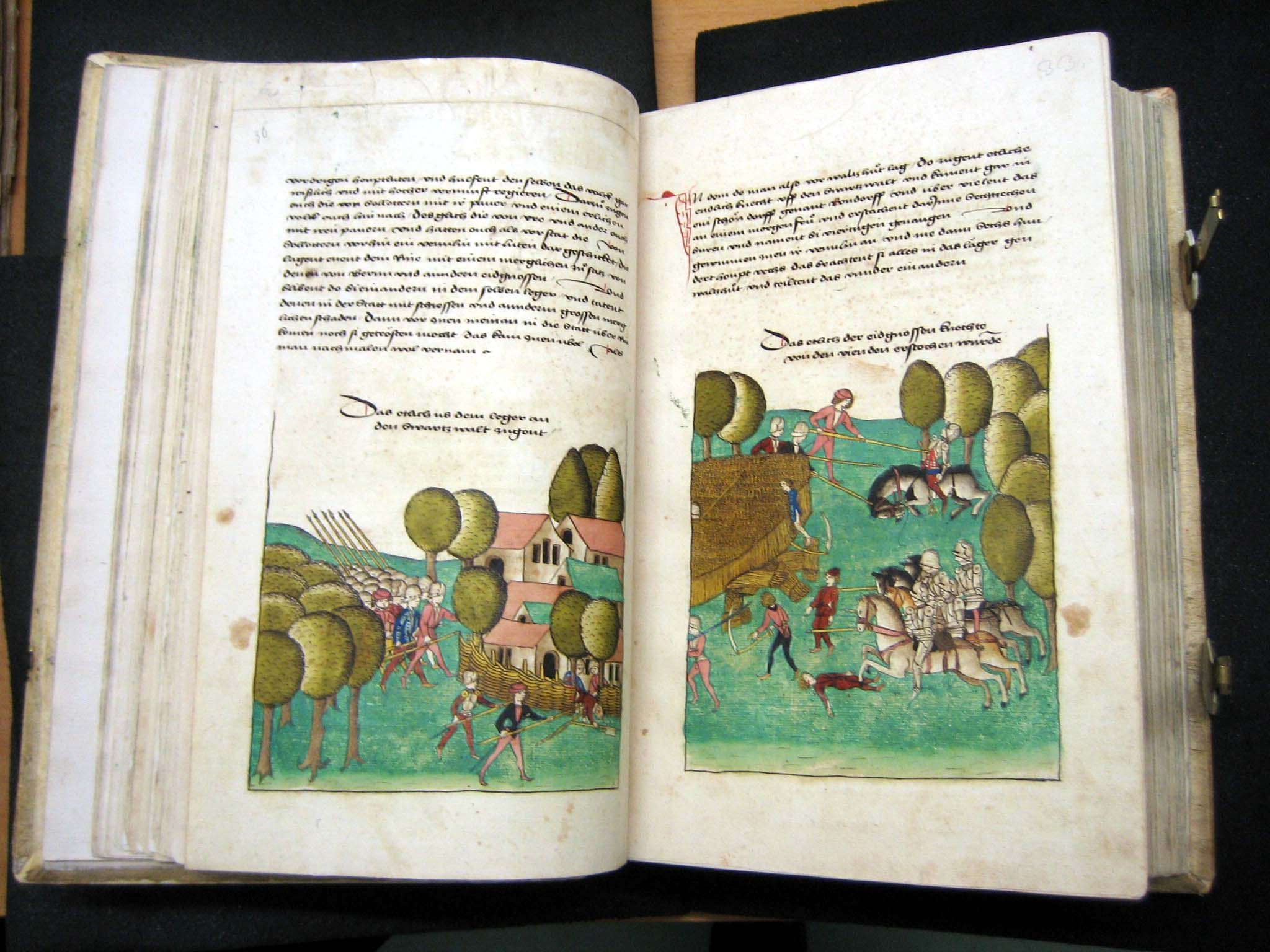 Aus der Burgunderchronik von Diebold Schilling dem Älteren